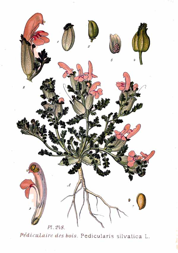 Pedicularis silvatica L.